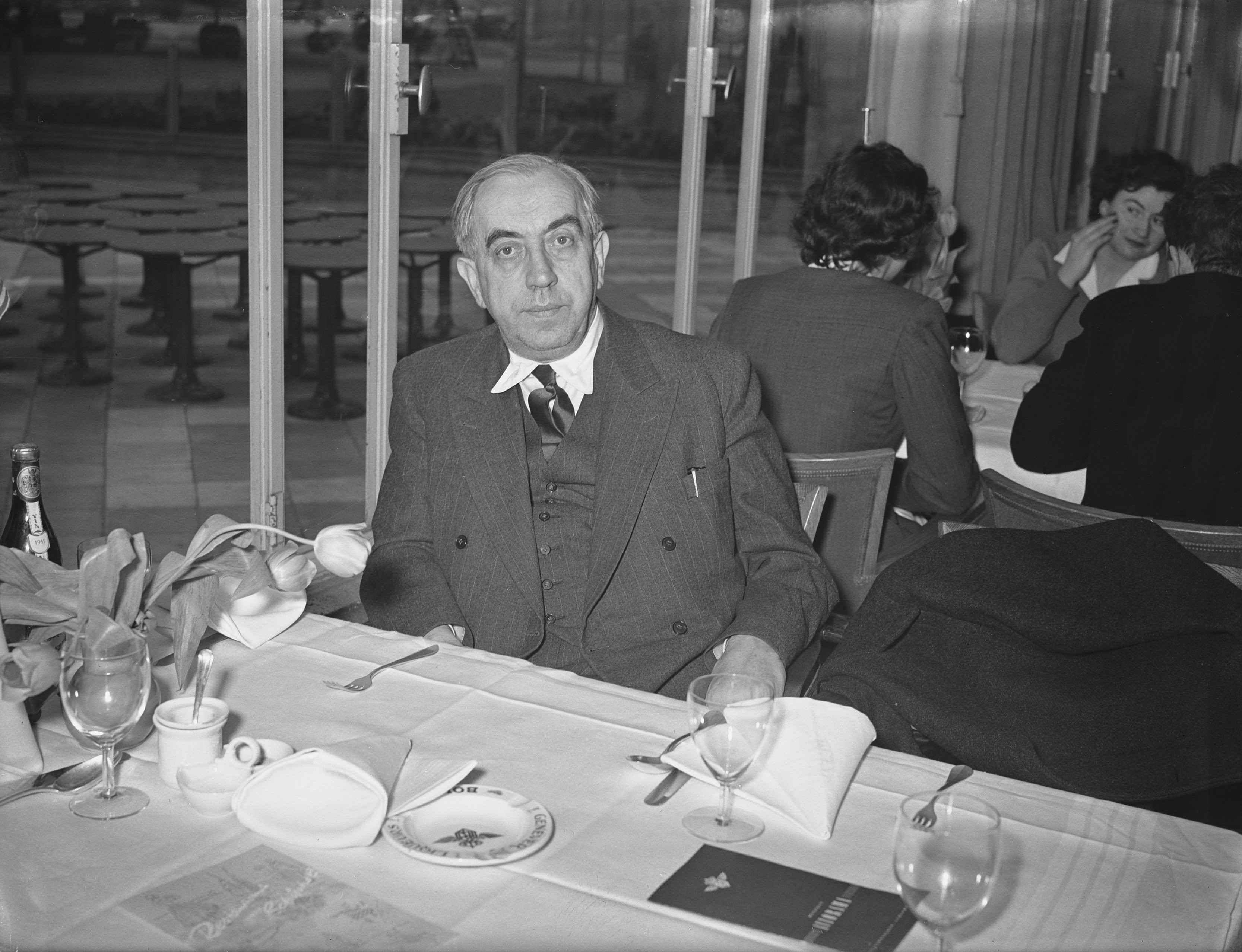 Professor Ernst Reuter, burgemeester van Berlijn, op Schiphol